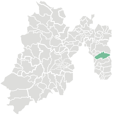 locatie van de gemeente Ixtapaluca in Mexico (staat)